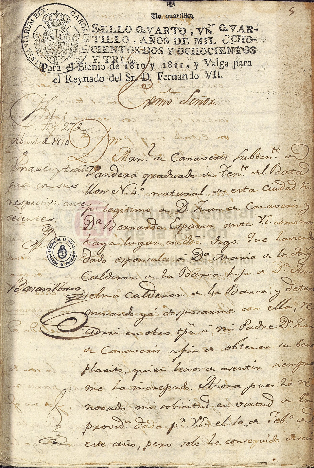 Registro acerca de la solicitud de Manuel de Canaveris, subteniente del 4° Batallón de Buenos Aires, para casarse con María de los Ángeles Calderón de la Barca.